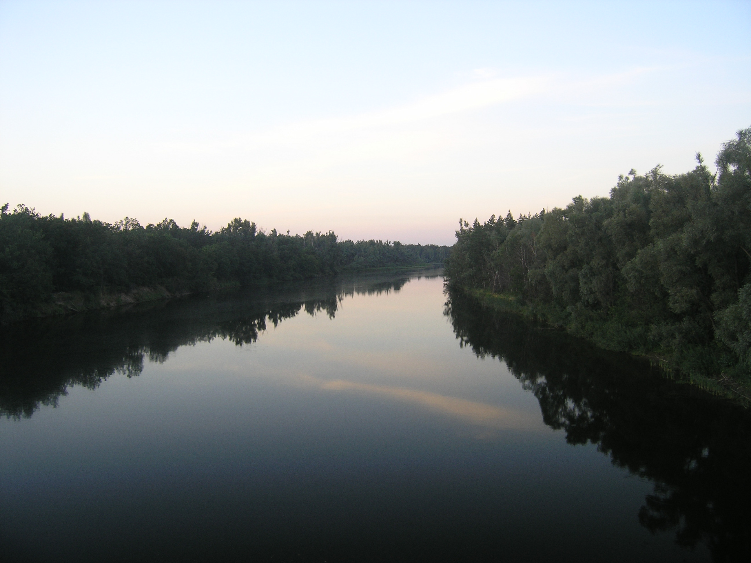 Река Большой Черемшан с Ивановского моста на трассе P240. Ульяновская область. Россия